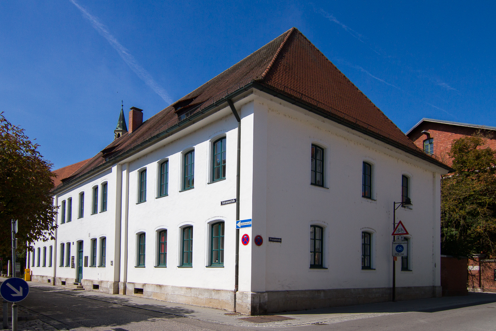 Verwaltungsgebäude des königlichen Proviantamtes, freistehender zweigeschossiger Bau mit Mittelrisalit und Walmdach, 1880, ursprüngliche Sichtziegelfassaden jetzt verputzt.This is a photograph of an architectural monument.